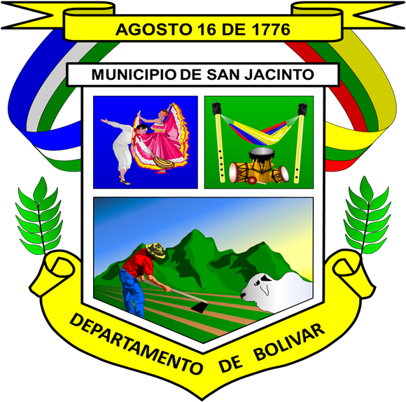 ESCUDO DEL MUNICIPIO DE SAN JACINTO BOLIVAR